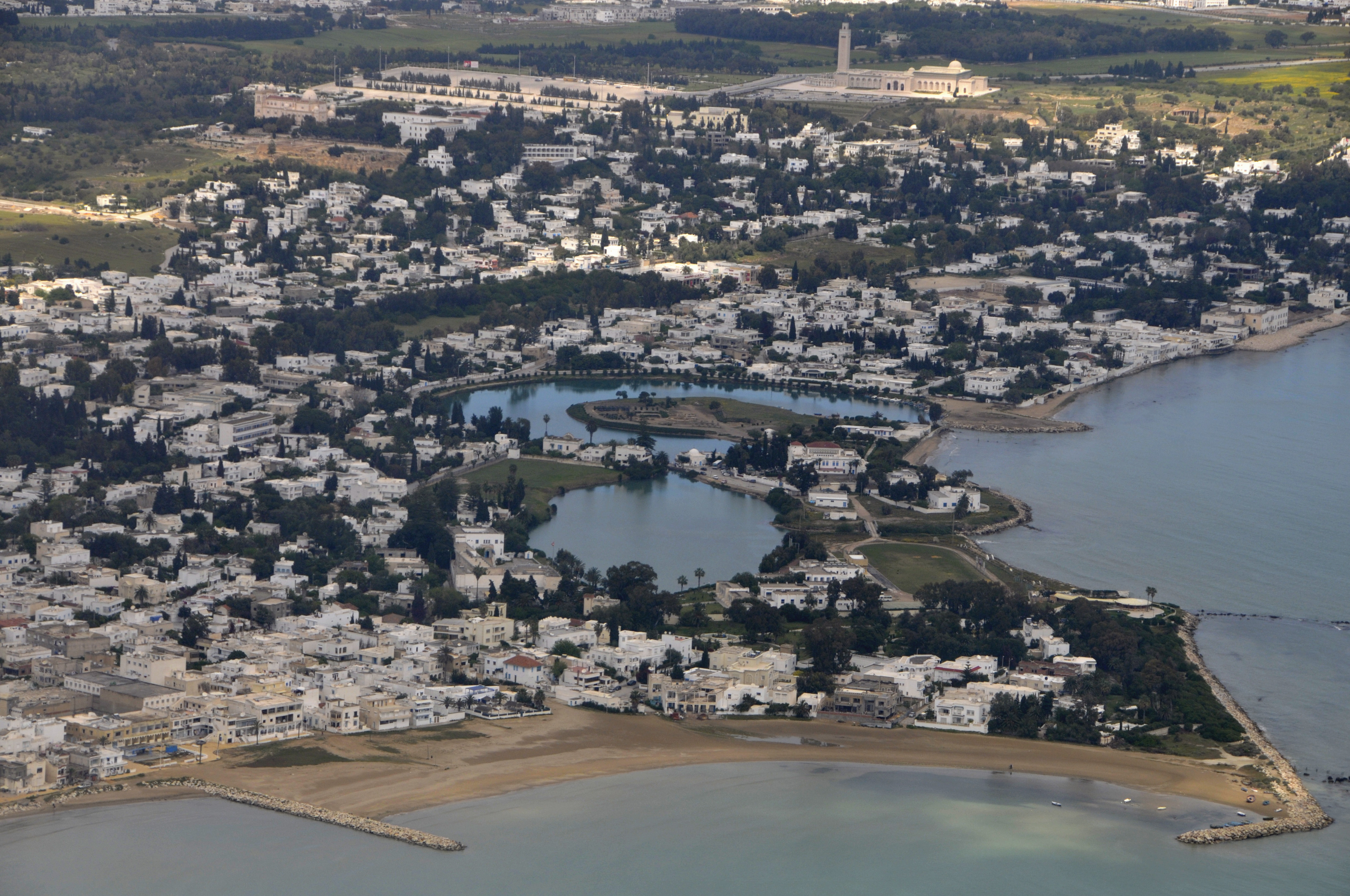 On voit les ports puniques. Au fond de la photo, on voit la mosquée El Abidine.